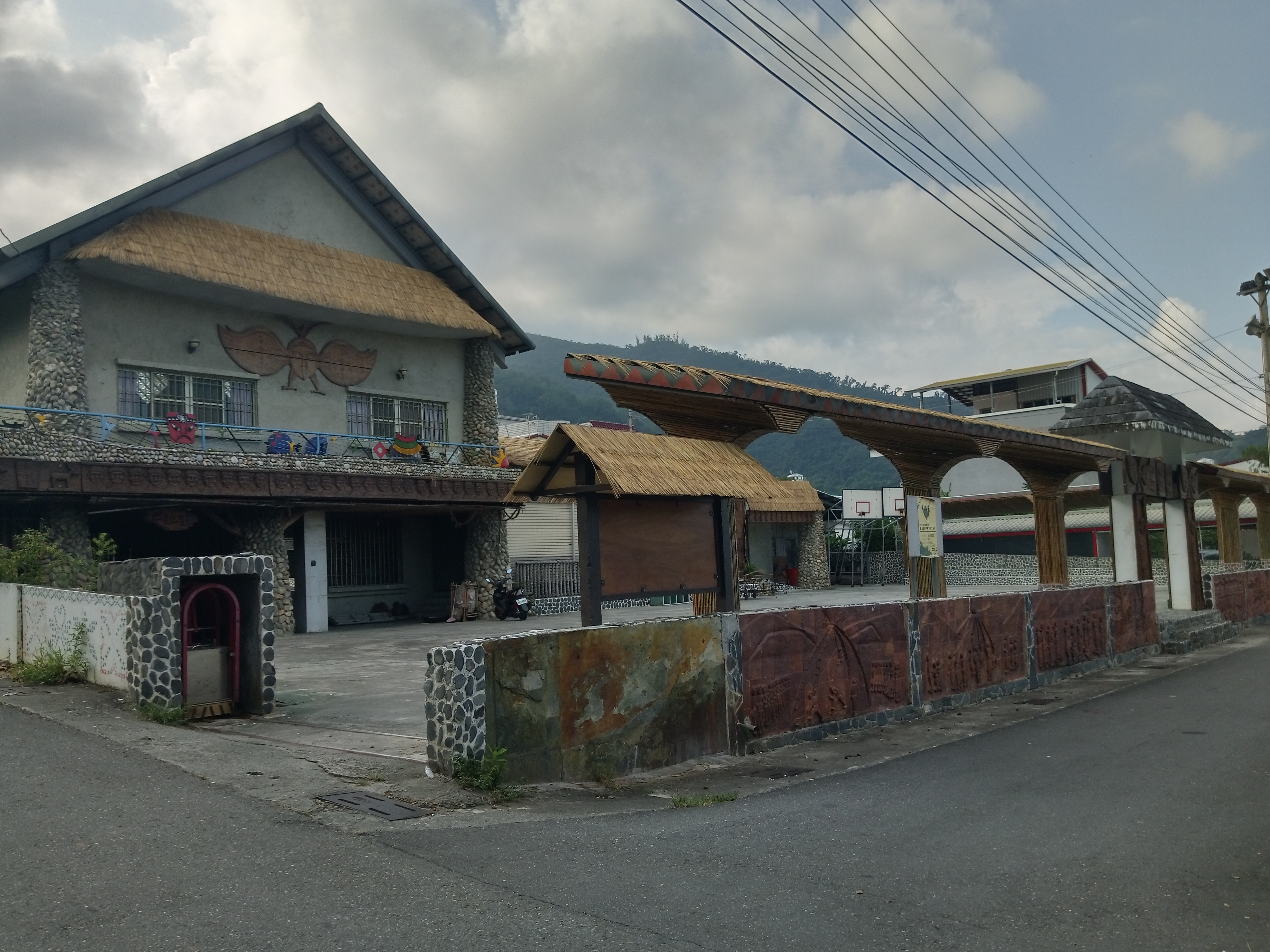 初鹿部落集會所